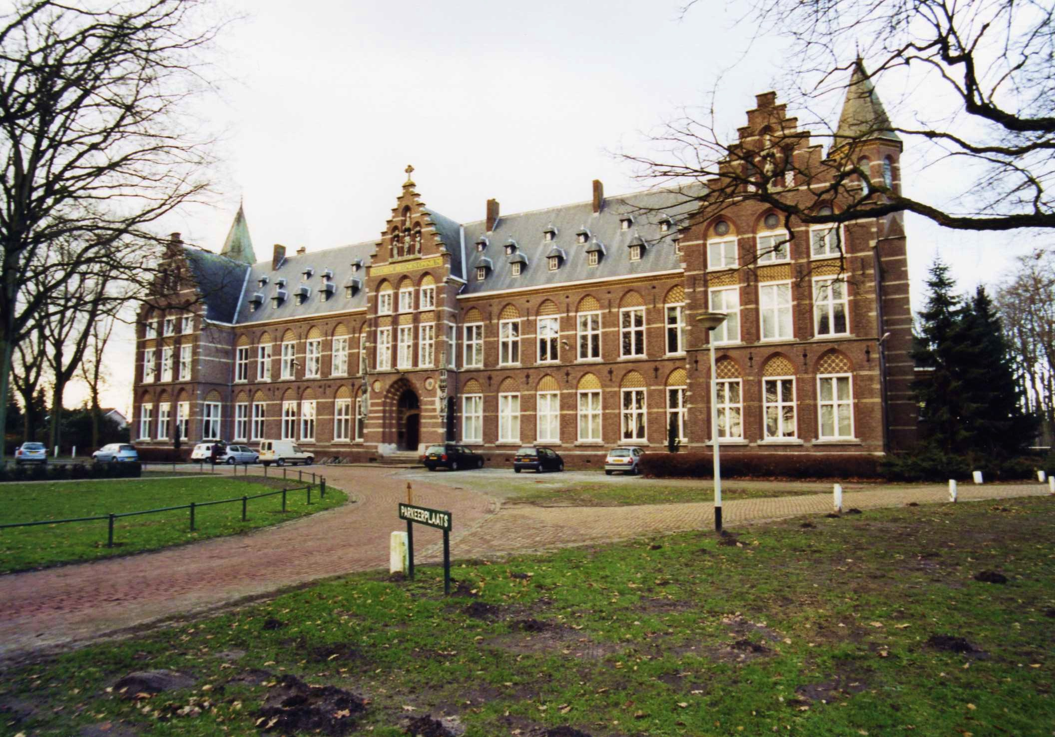 Huize Bovendonk te Hoeven.